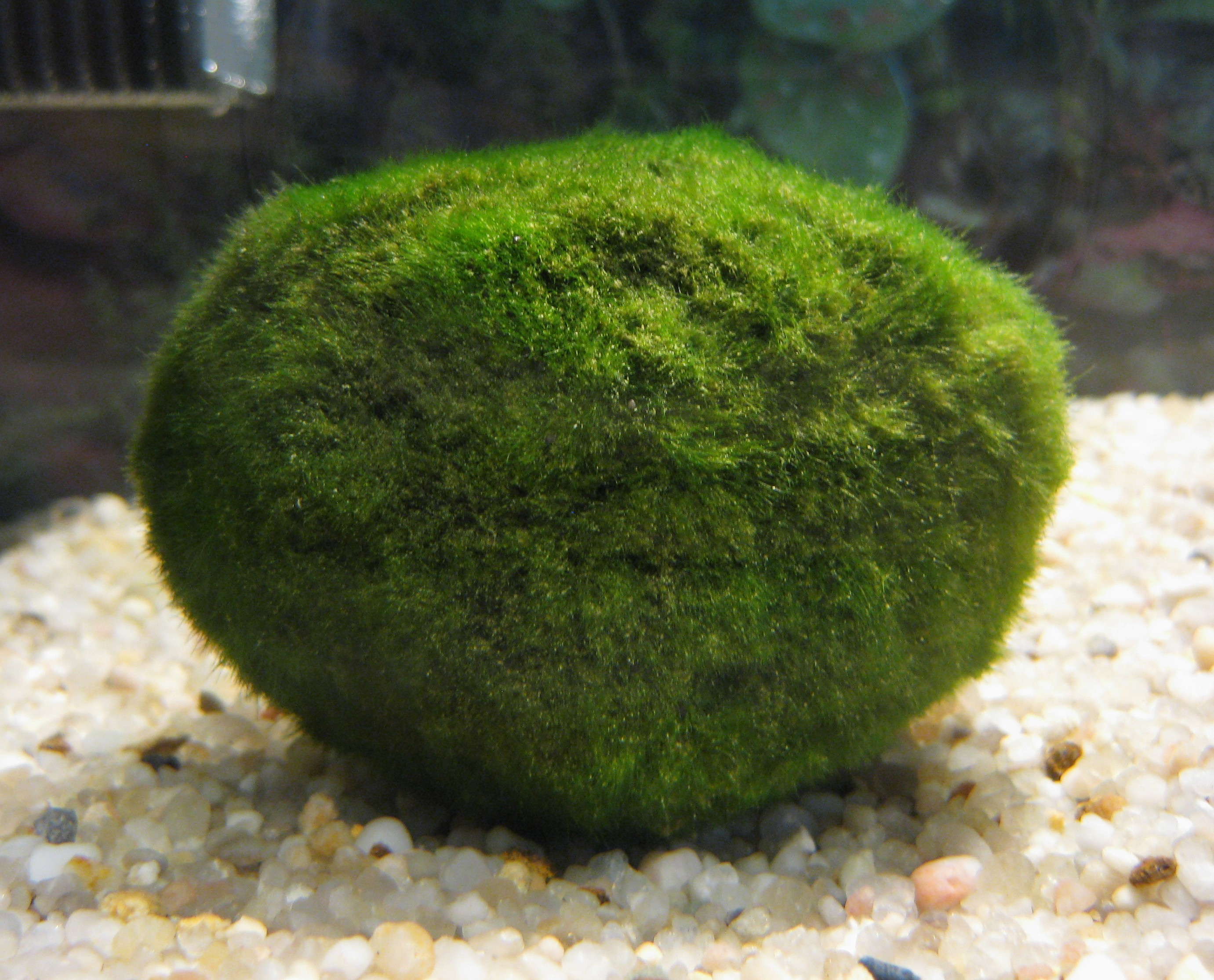 Glon wielokomórkowy z gromady zielenic